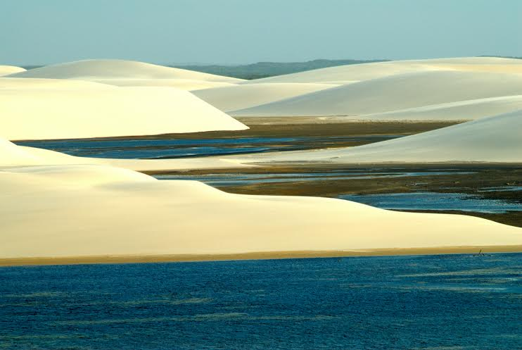 Lagoa das Gaivotas em Santo Amaro